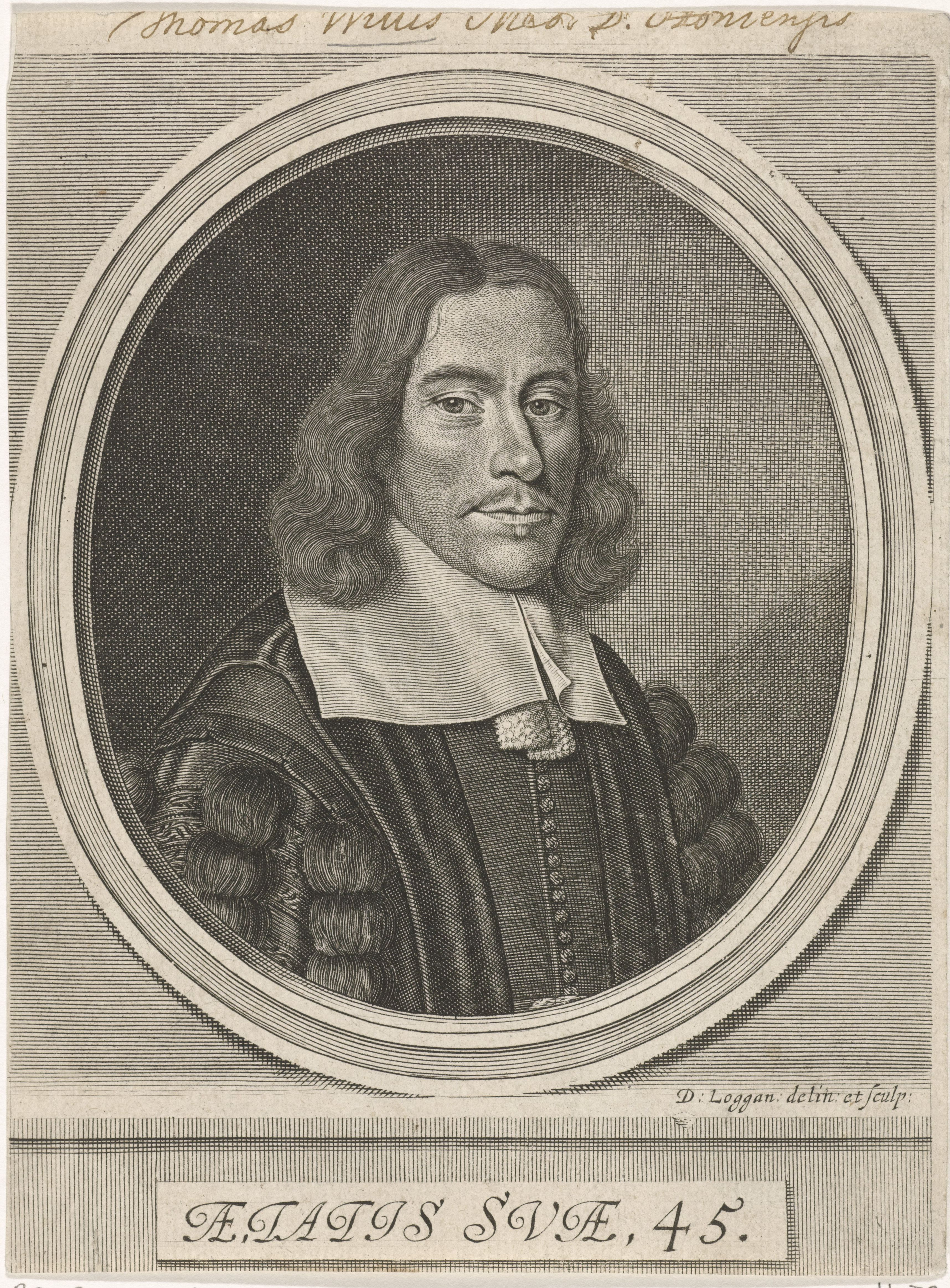 IdentificatieTitel(s): Portret van Thomas WillisObjecttype: prent Objectnummer: RP-P-1910-415Catalogusreferentie: Hollstein Dutch 70Opschriften / Merken: verzamelaarsmerk, verso, gestempeld: Lugt 2228opschrift, recto, handschrift in bruine inkt: ‘Thomas Willis [...]’, opschrift gedeeltelijk afgesnedenOmschrijving: Portret van Thomas Willis, geneesheer te Oxford, Engeland.VervaardigingVervaardiger: prentmaker: David LogganDatering: 1666 - 1692Fysieke kenmerken: gravureMateriaal: papier Techniek: graveren (drukprocedé)Afmetingen: blad: h 187 mm × b 140 mmOnderwerpWie: Thomas WillisVerwerving en rechtenVerwerving: aankoop 1905Copyright: Publiek domein